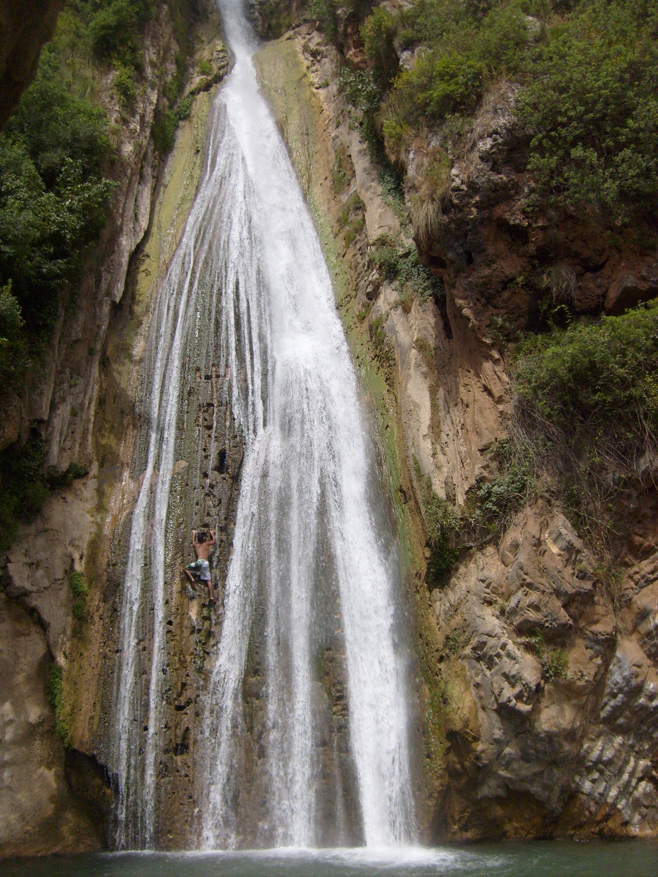 Водопад Кефрида в Беджаи